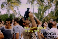 l'Explosion de l'essai CAPRICORNE s'est produite. Puissance 4 kilotonnes Nous voyons le personnel resté sur la zone vie MARTINE pendant cet essai, à proximité de ce dernier. Le nuage radioactif survol l'atoll. Le personnel sur place, filme.Nous remarquerons que ces militaires et personnels civils , n'étaient pas protégés. Contrairement aux affirmations mensongères de l'ETAT français, toutes les mesures de protection n'étaient pas respectées. Cette photo fait partie d'un dossier comprenant clichés et vidéos montrant le déroulement de certains essais . Cette y demuestra que, contrariamente a lo afirmado por el Estado francés todas las medidas de protección estaban lejos de ser llevado. colgante de más pruebas, muchos de los personajes se quedaron este foto es parte de un archivo que contiene las imágenes fijas más reveladores. Nous sommes le 16 juin 1974.Jean Yves filme / Gérard J